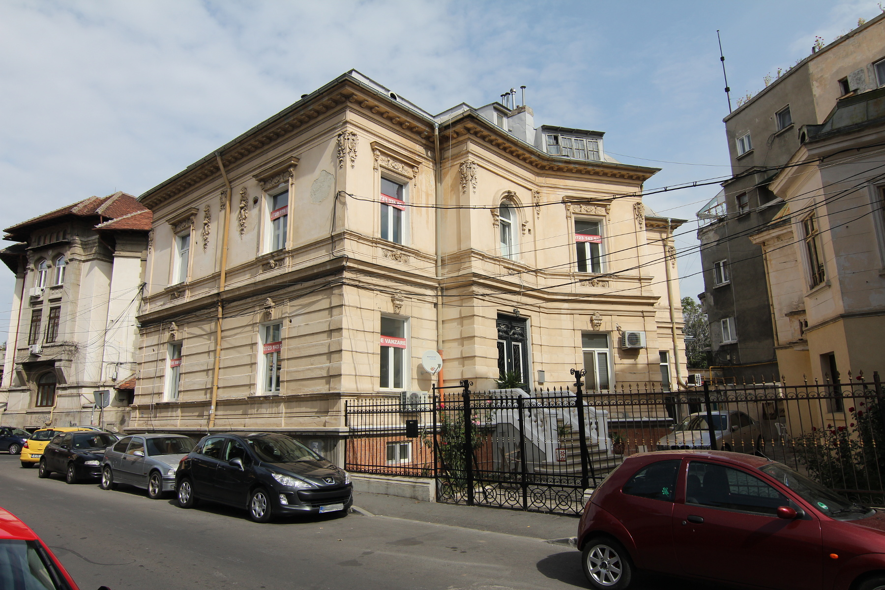 Casă pe Radu Calomfirescu